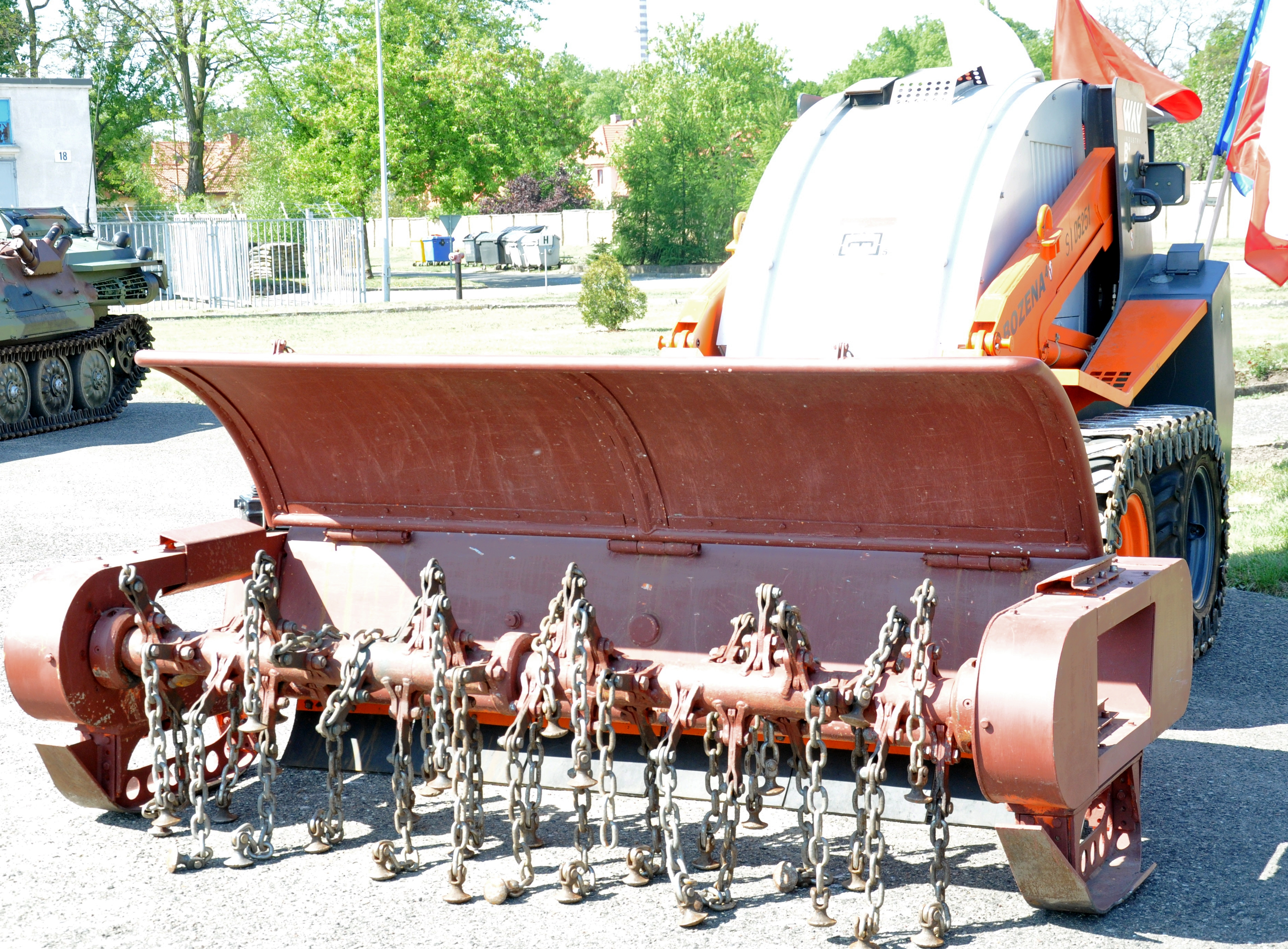 Trał Bożena 4 ( z 5 pinż ze Szczecina